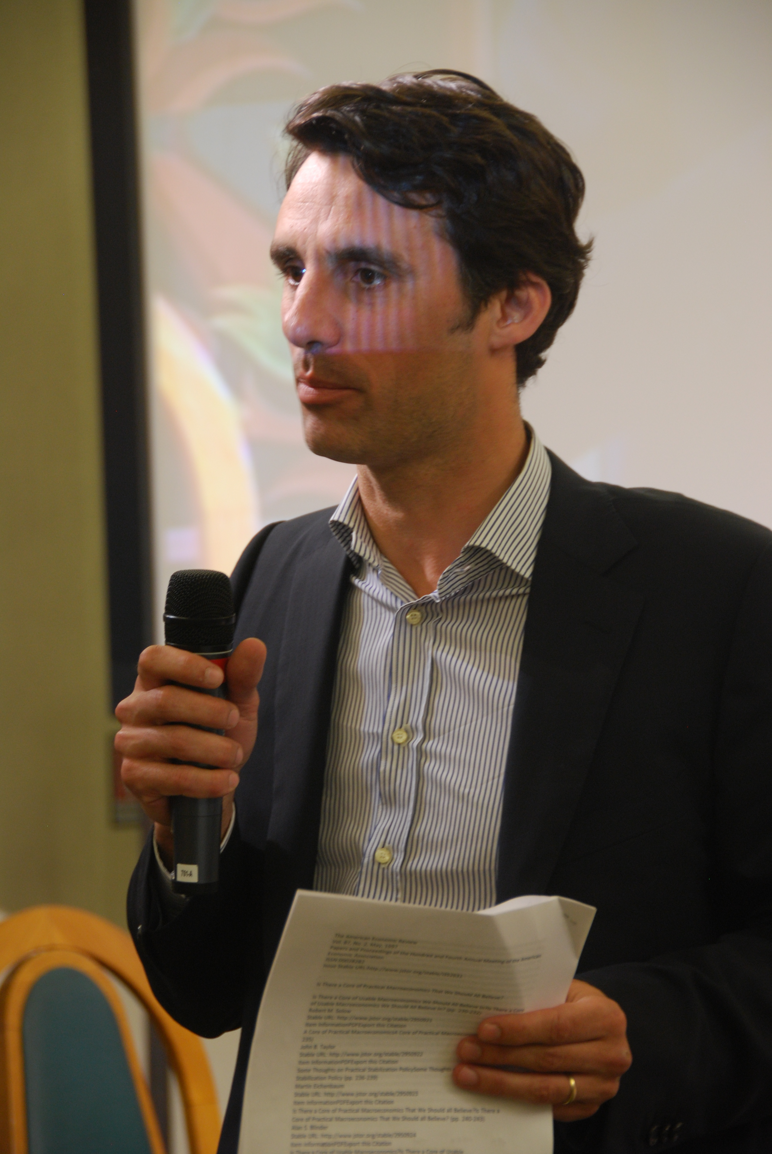 Andrea Prat, economista, al Festival dell'Economia di Trento.